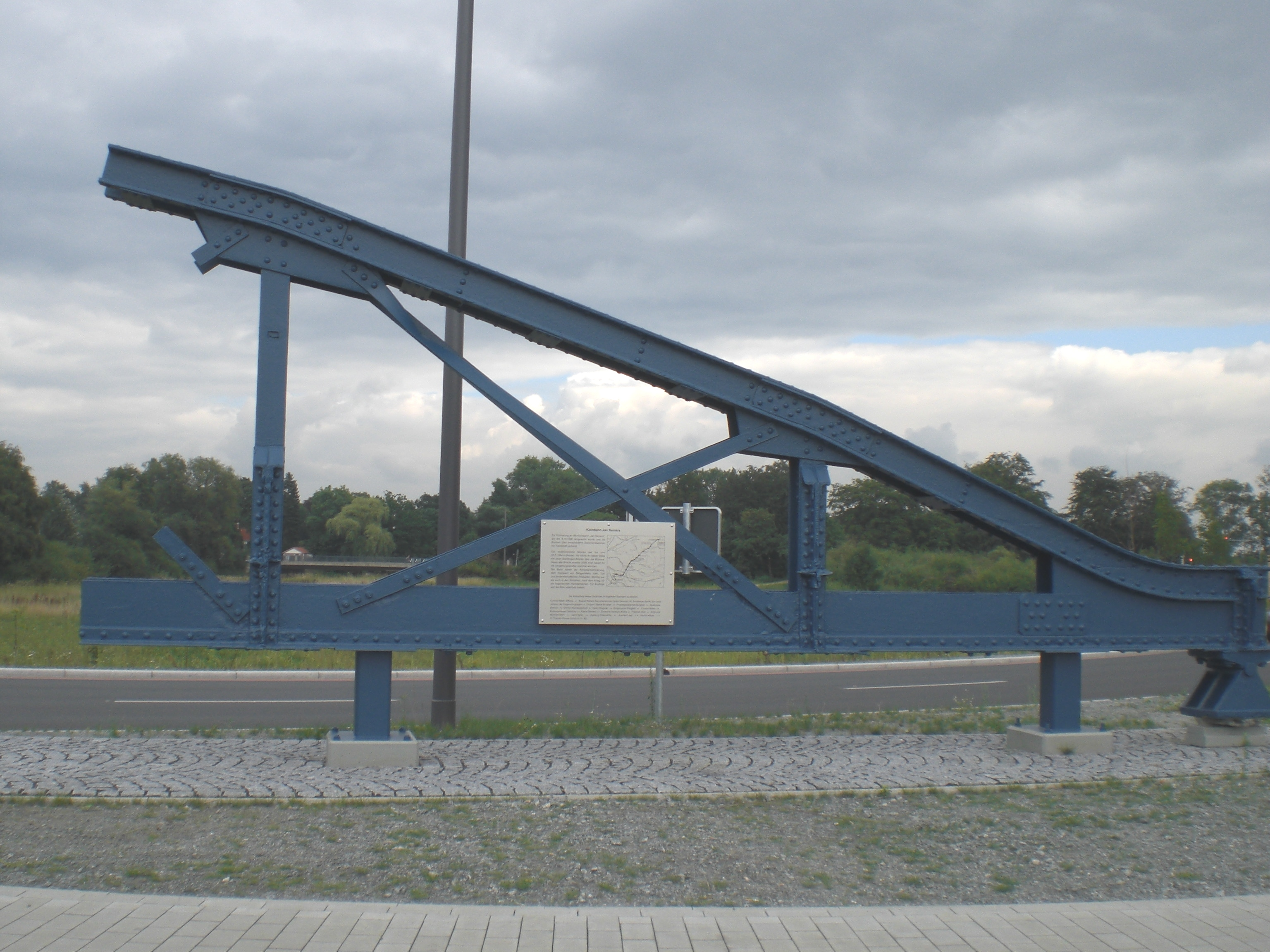 Fragment der Jan-Reiners-Brücke über die Wümme bei Lilienthal. Die Brücke musste der Ortsumgehung weichen.